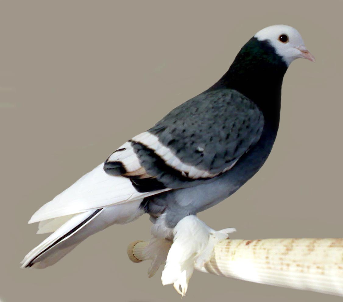 Saxon Monk (blue lace bar)